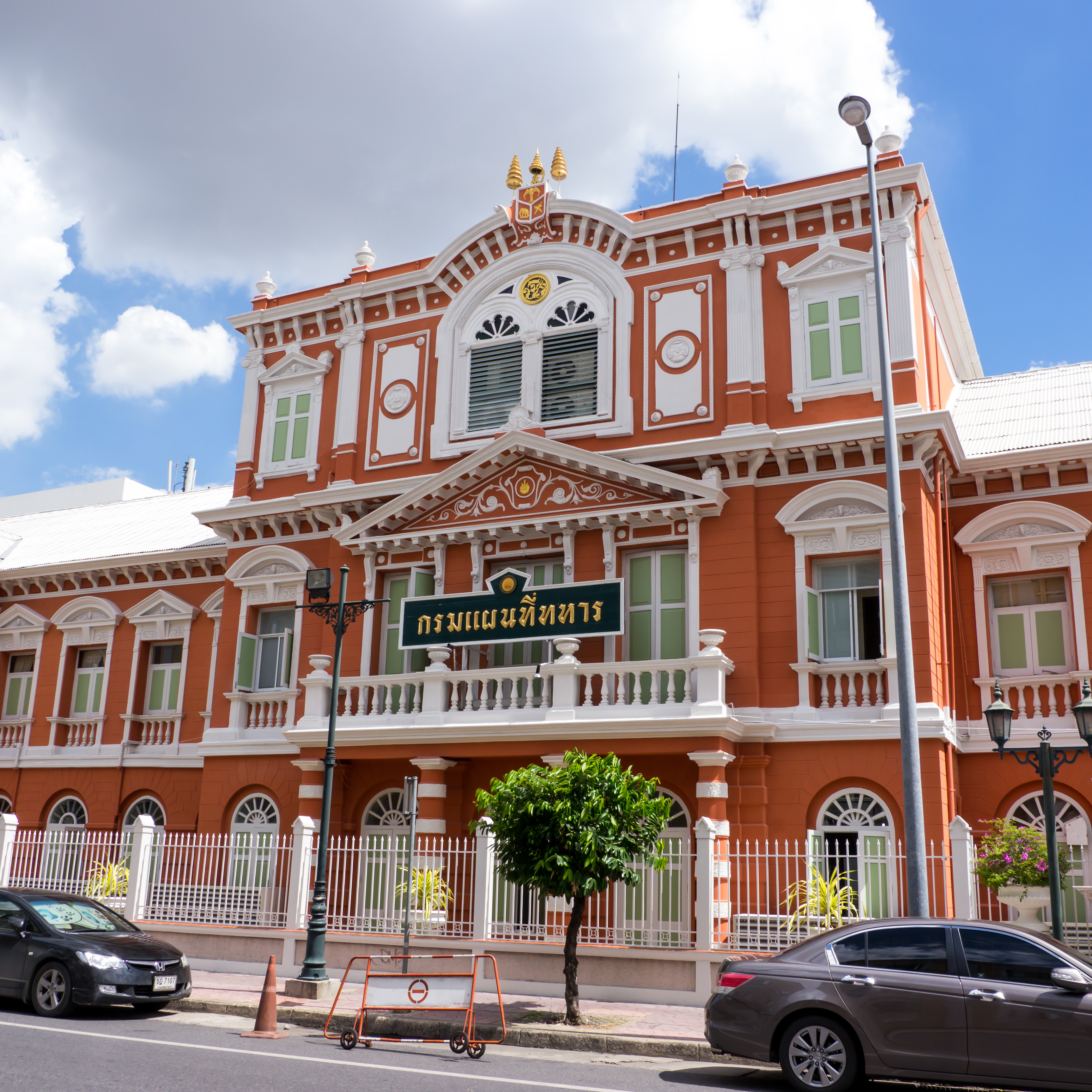 กรมแผนที่ทหาร